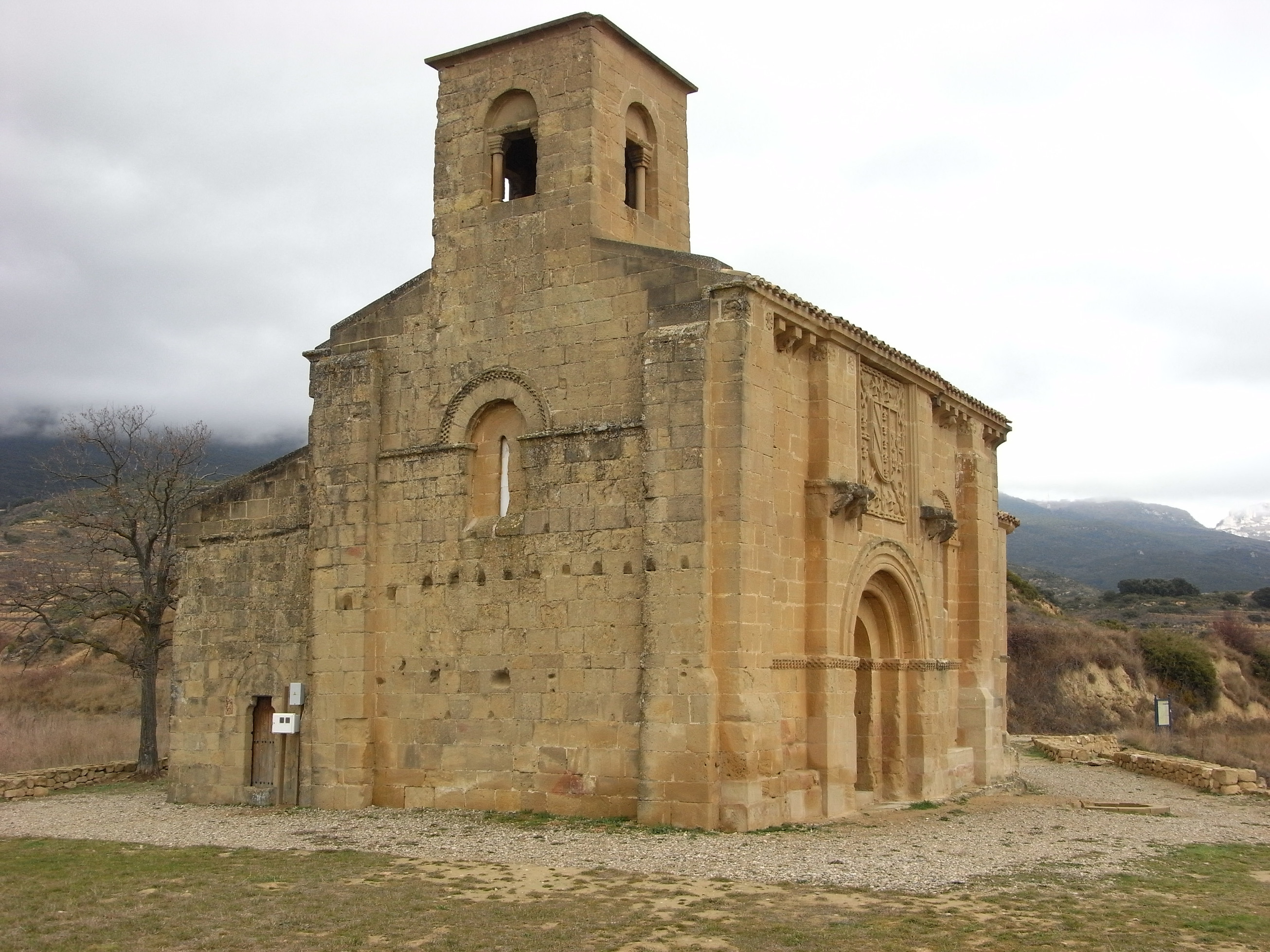 Suroeste de la Ermita de Santa María de La Piscina en La Rioja (España)